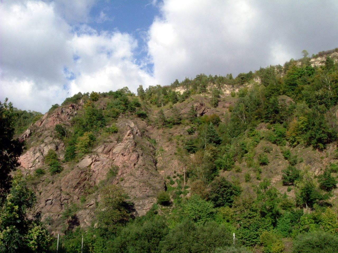 Nationales Geotop: Bohlenwand: Transgression von Zechstein (hell) über gefalteten devonischen Gesteinen (NSG Nr. 160 Bohlen WDPA ID 162484)